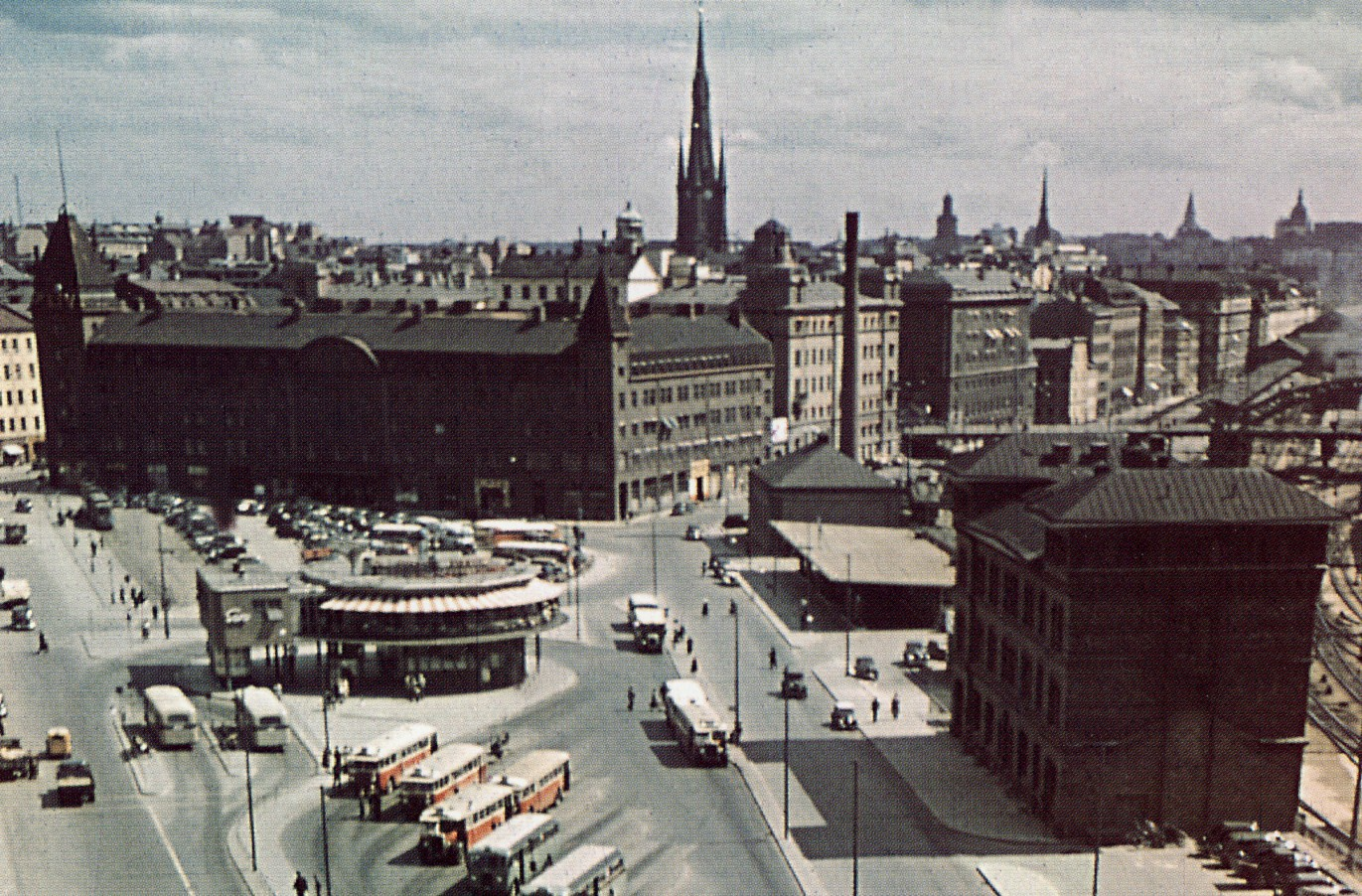 Holger Bloms busskiosk ”Rotundan” på Norra Bantorget i Stockholm.